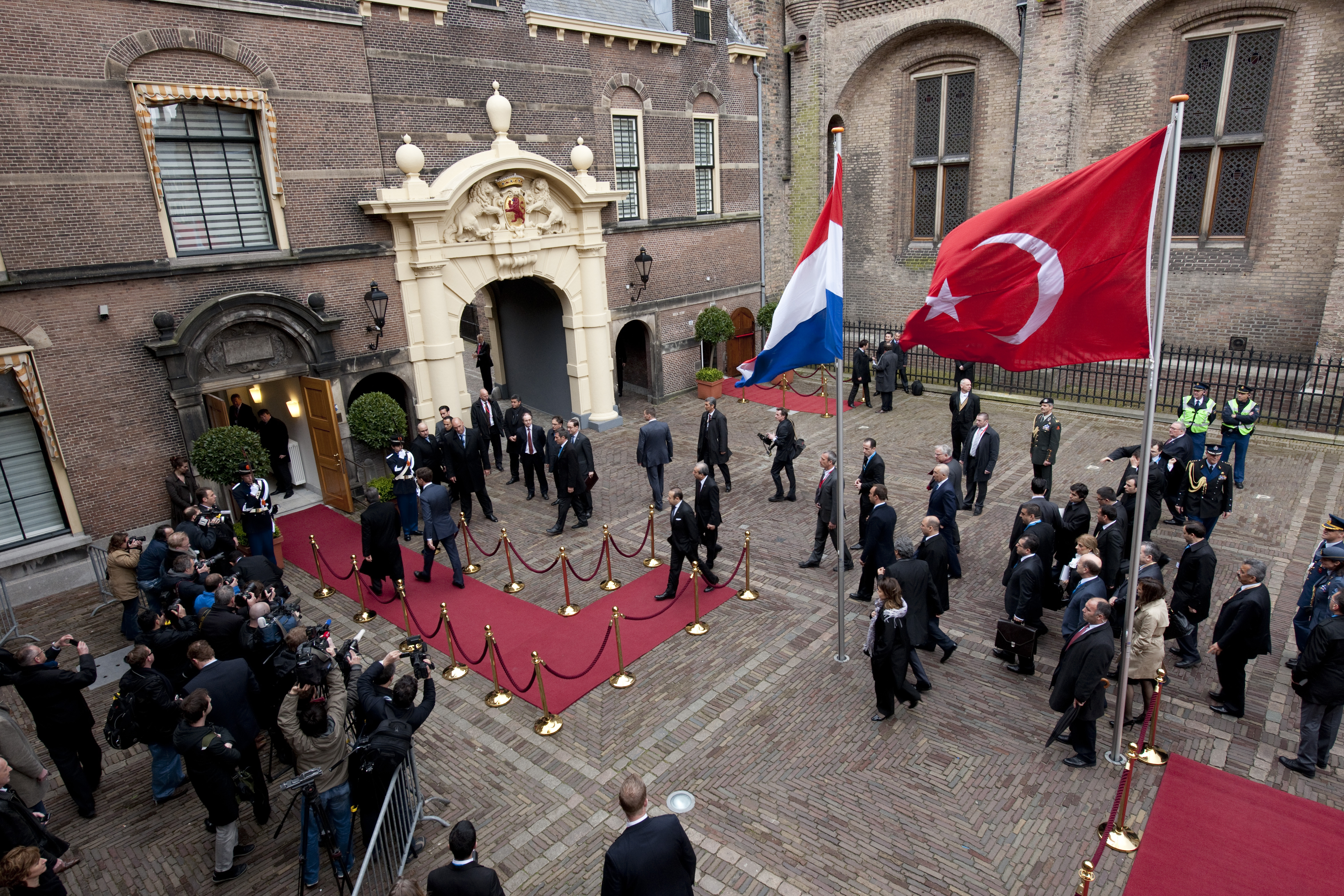 Minister-president Rutte ontvangt president Gül van Turkije op het Binnenhof. Op uitnodiging van de Koningin brengen de president en zijn echtgenote van dinsdag 17 tot en met donderdag 19 april een staatsbezoek aan Nederland.